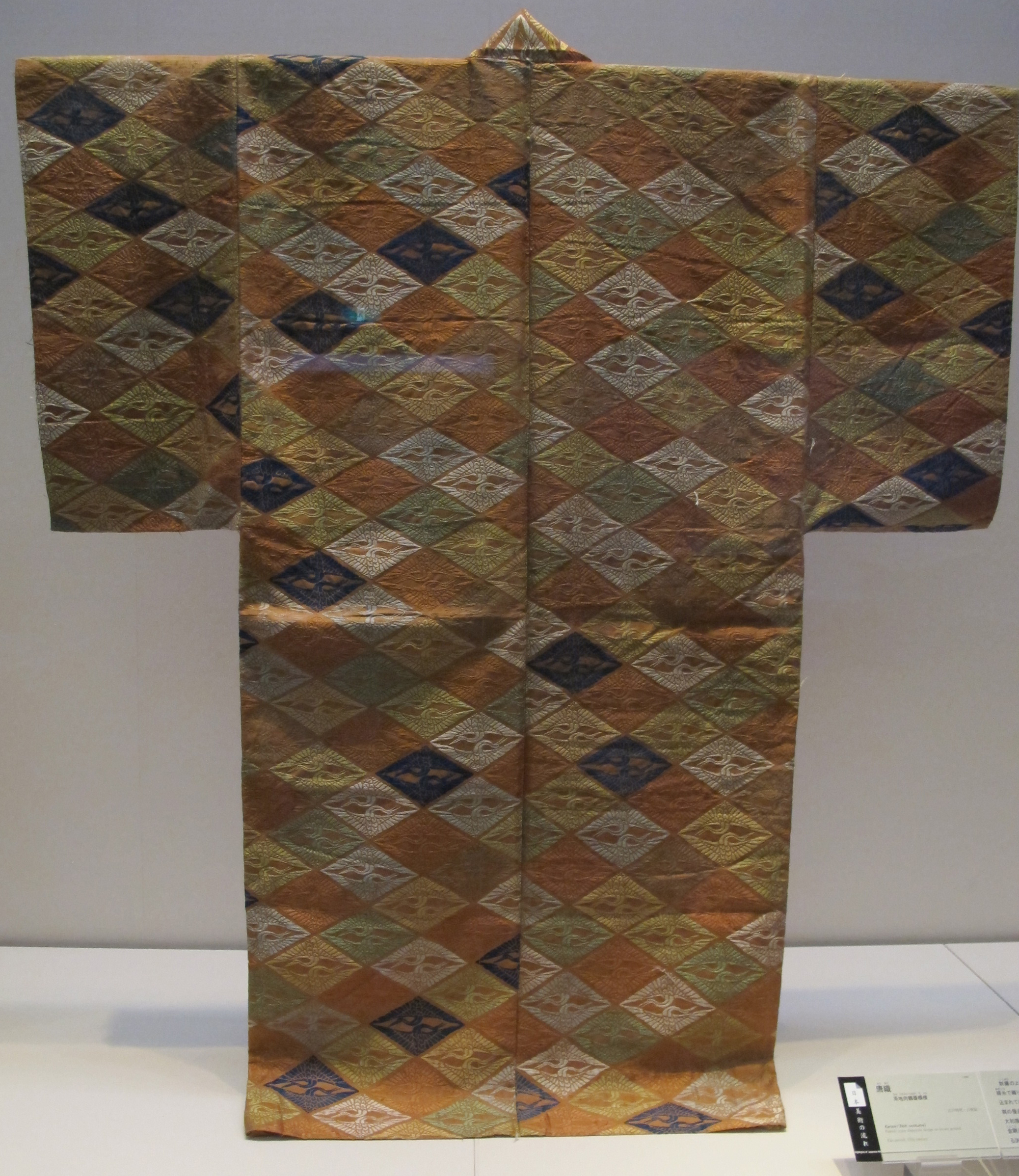 Periodo edo, costume per il Noh, Karaori, XVII sec